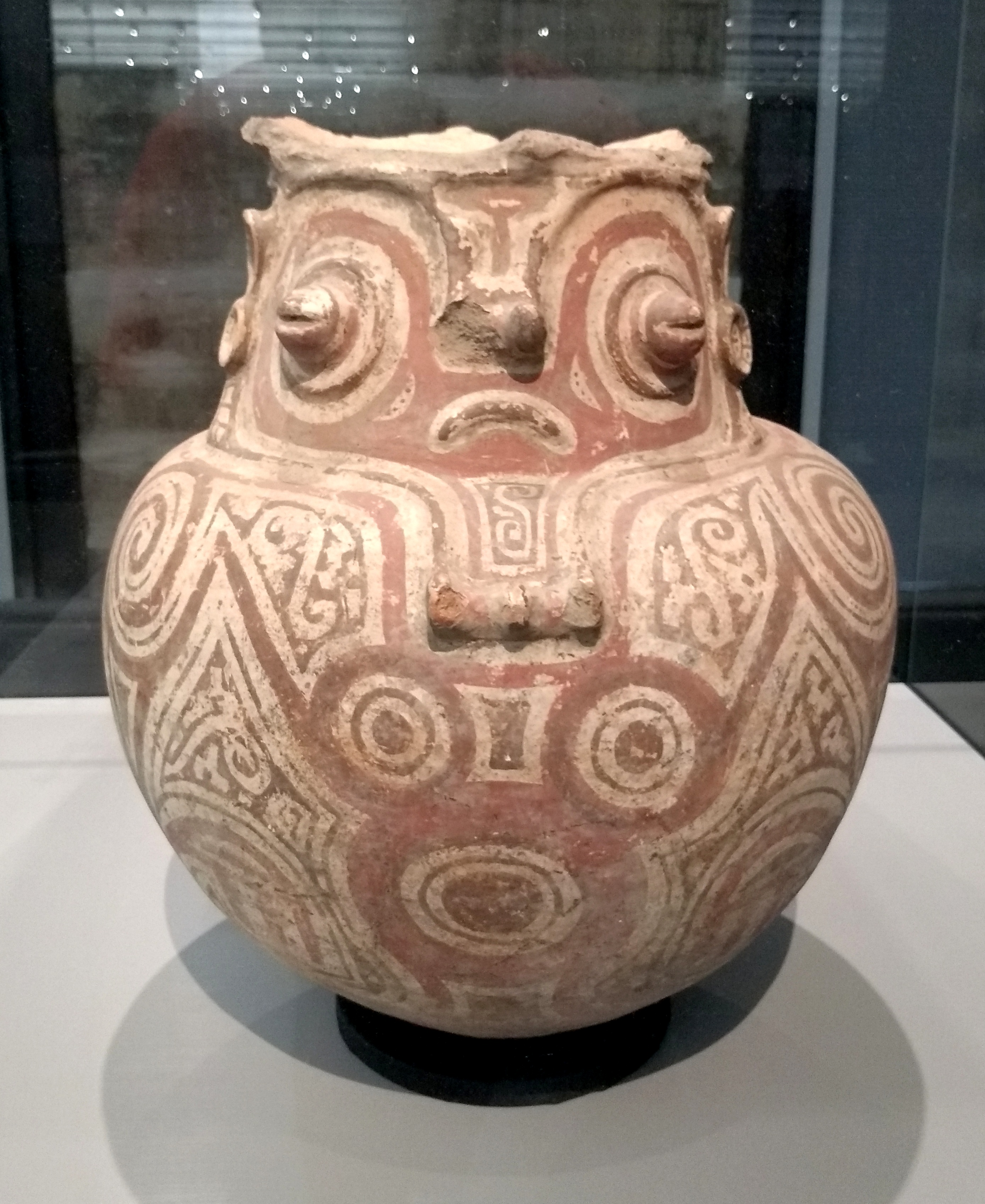 A Marajoara Culture funerary urn.